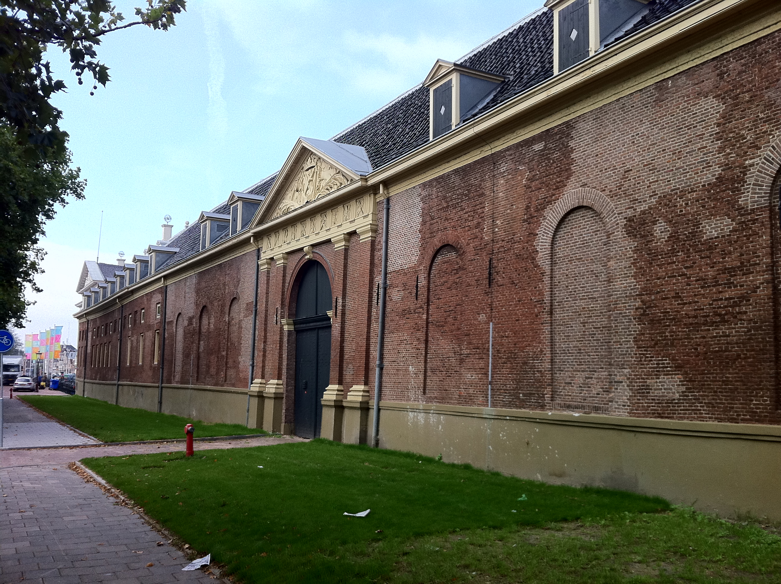 Amsterdam - Kattenburgerstraat Rijkswerf